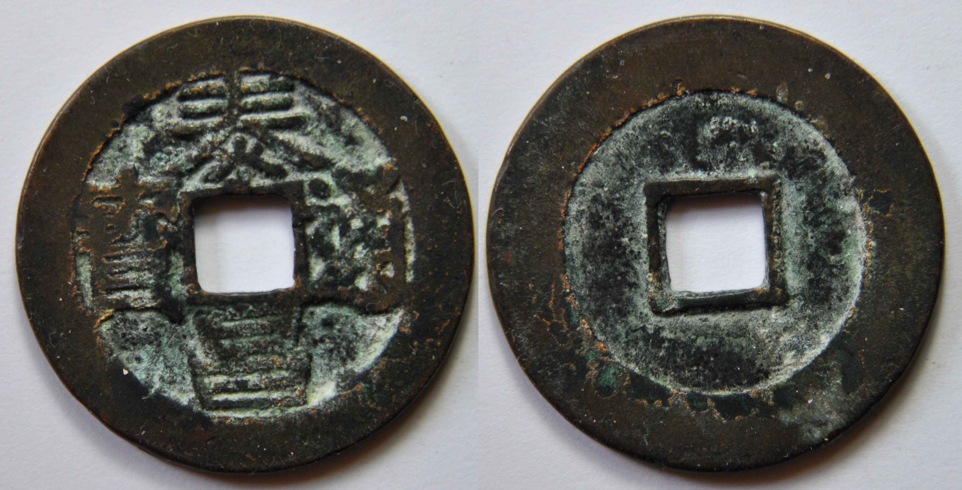 Une monnaie en bronze ou en laiton d'une sapèque (1 cash) de l'empereur Guang Zong (1620) ère Tai Chang de la dynastie Ming (1368-1644). Cet empereur n'a régné qu'un mois. Par piété filiale, son successeur, Xi Zong, a continué à fabriquer des monnaies Tai Chang pendant le reste de l'année. A/ Tai Chang tong bao (Monnaie courante de Tai Chang) R/ Vide Dimension : 25.26 mm Poids : 3.5 g. Référence : H20.168 Indice de rareté : 12 (Commune d'après D.Hartill)